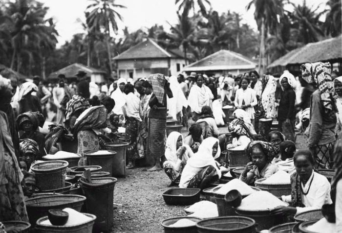 Foto. Vrouwen op de markt in Kandangan